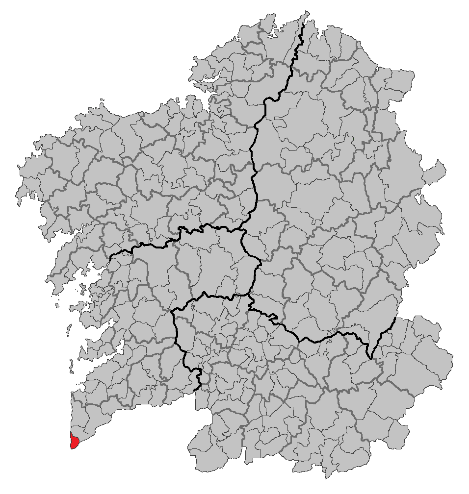 Mapa coa localización do concello de A Guarda.